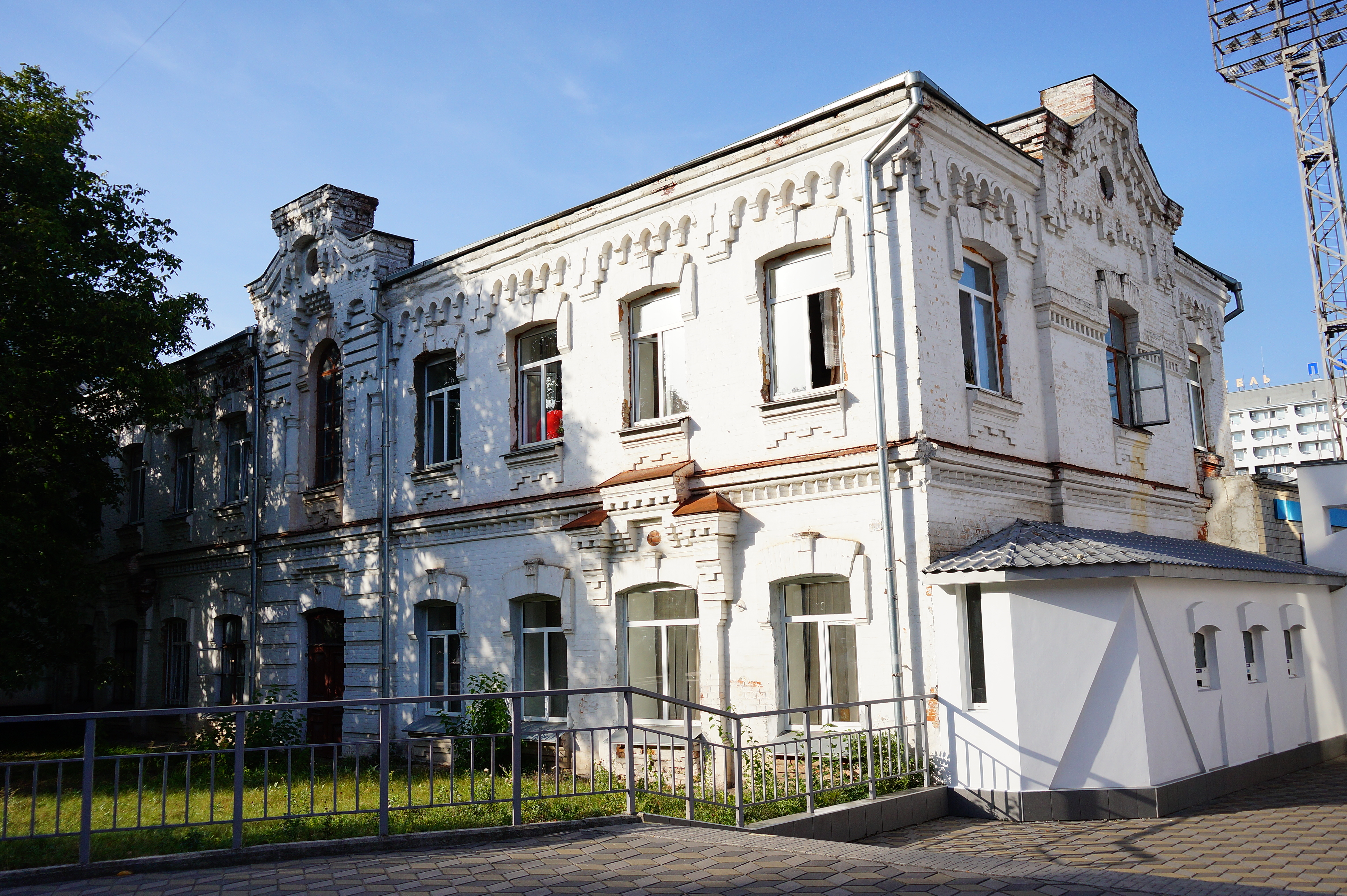 Музична школа (мур.), Хмельницький, вул. Проскурівська, 75